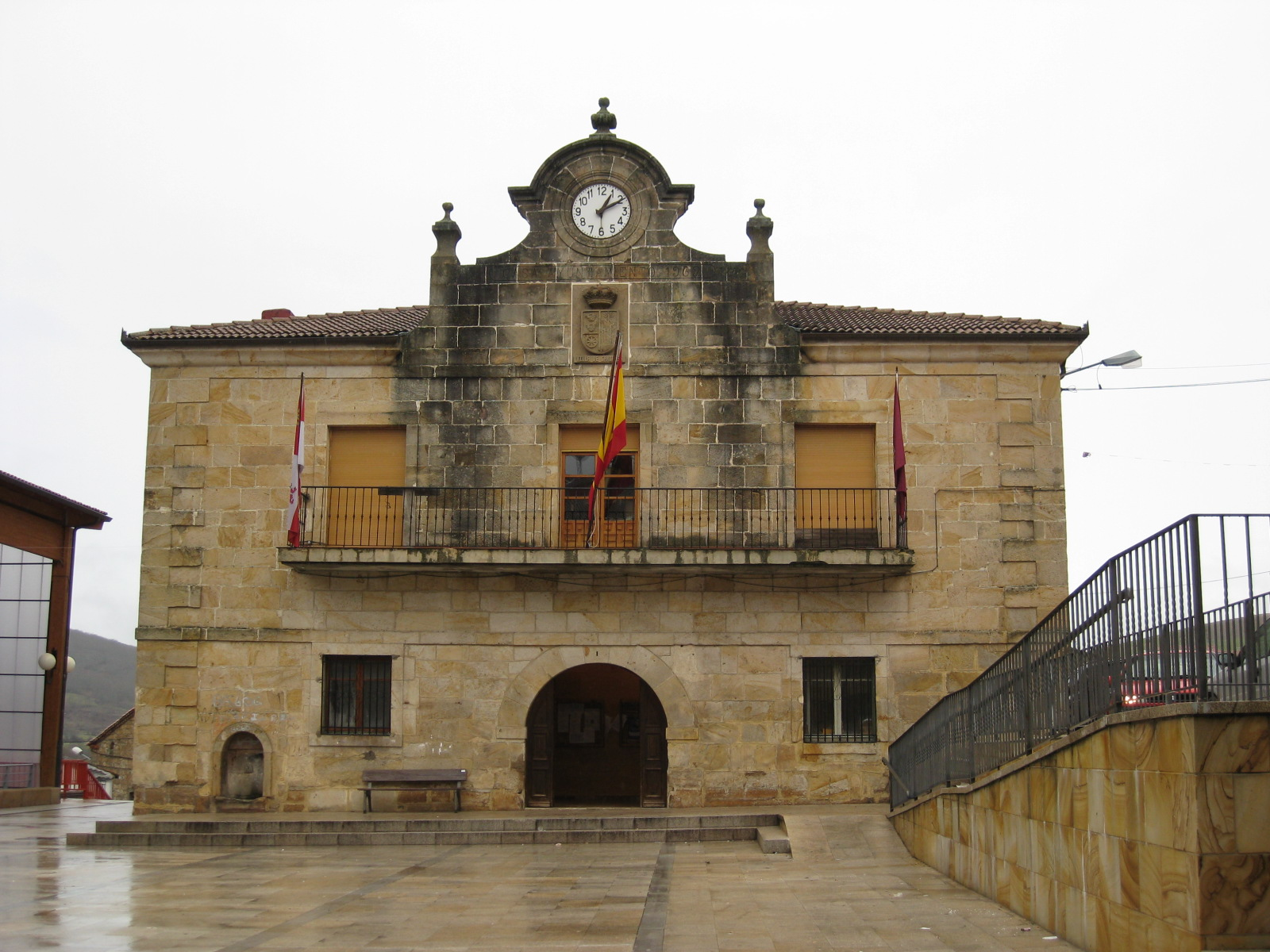 Vista del edificio del Ayuntamiento de Canicosa de la Sierra (Burgos, España).